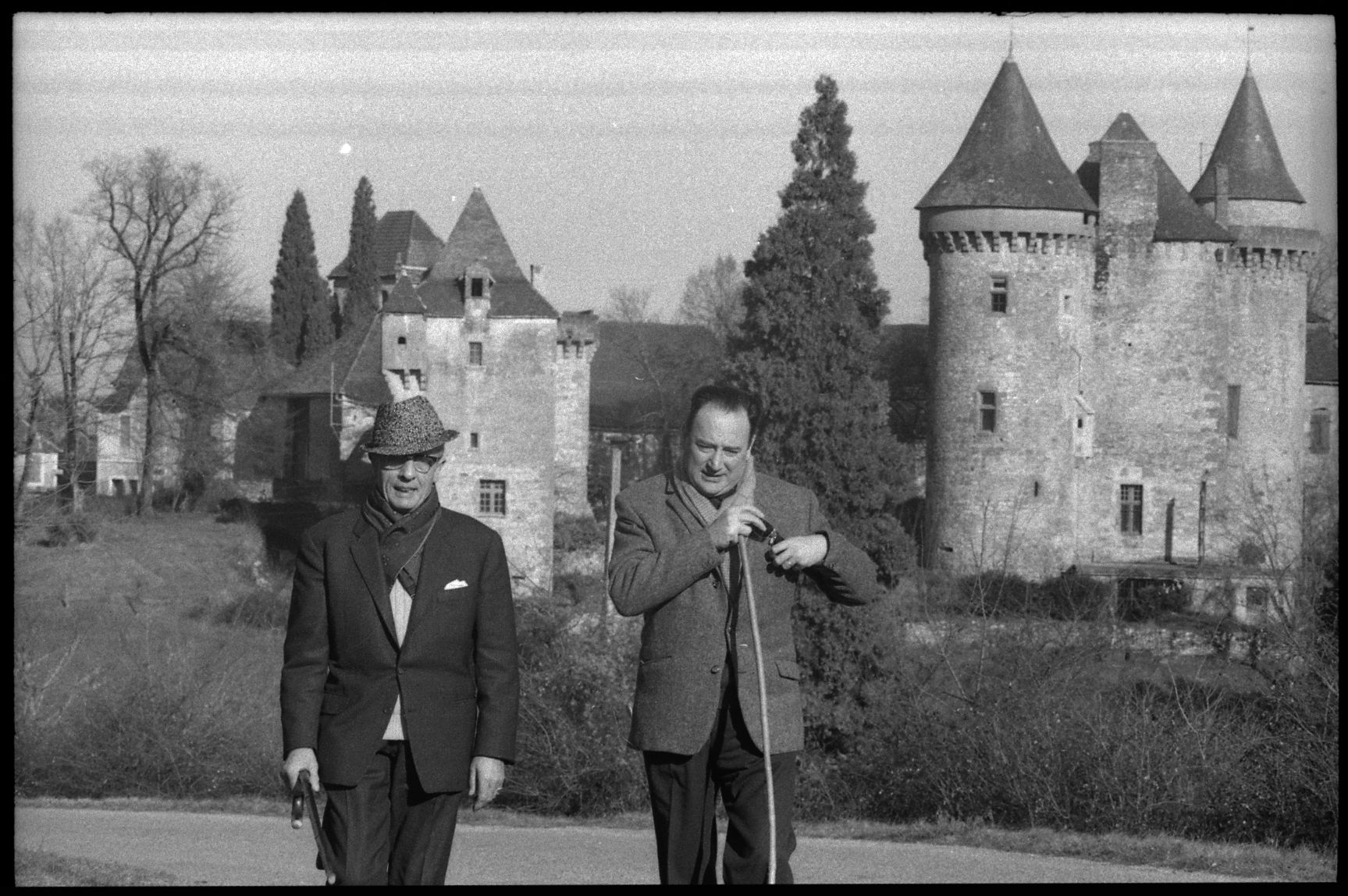 Département du Lot. 6 Janvier 1970. Vue de Maurice Faure et d'Irénée Lacombe devant un château lotois.